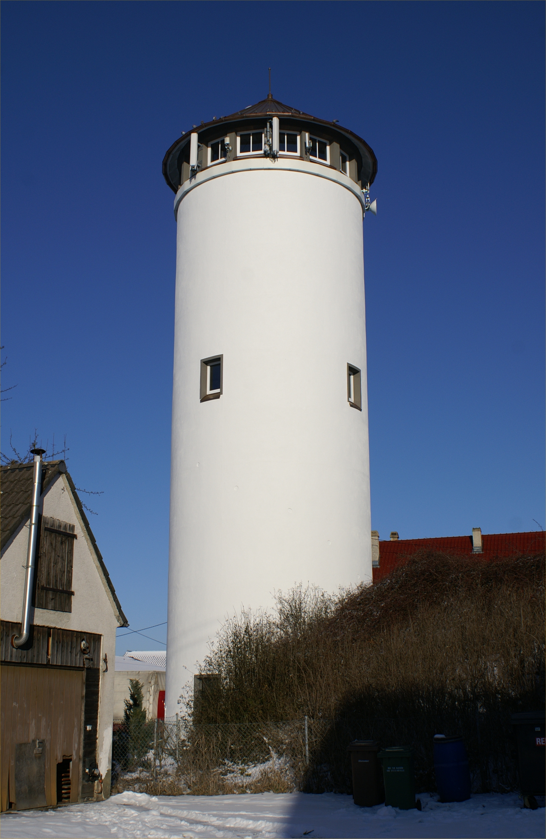 Der 28 Meter hohe Wasserturm im Dornstadter Ortsteil Scharenstetten. Urheber: Dr. Eugen Lehle Datum: 11.01.2009